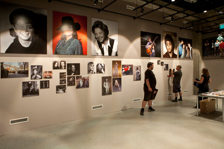 Robert Meyers fotoutstilling Icons of the 60's blir montert på Rockheim